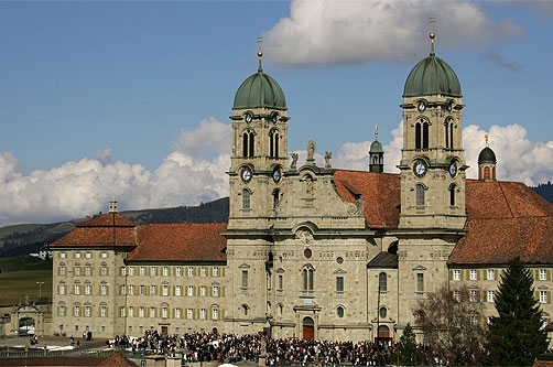 Chloschter Einsiedle am Karfriitig 2005, Schwiiz